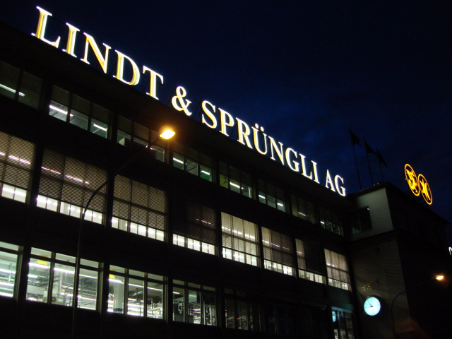 Lindt headquarters near Zurich